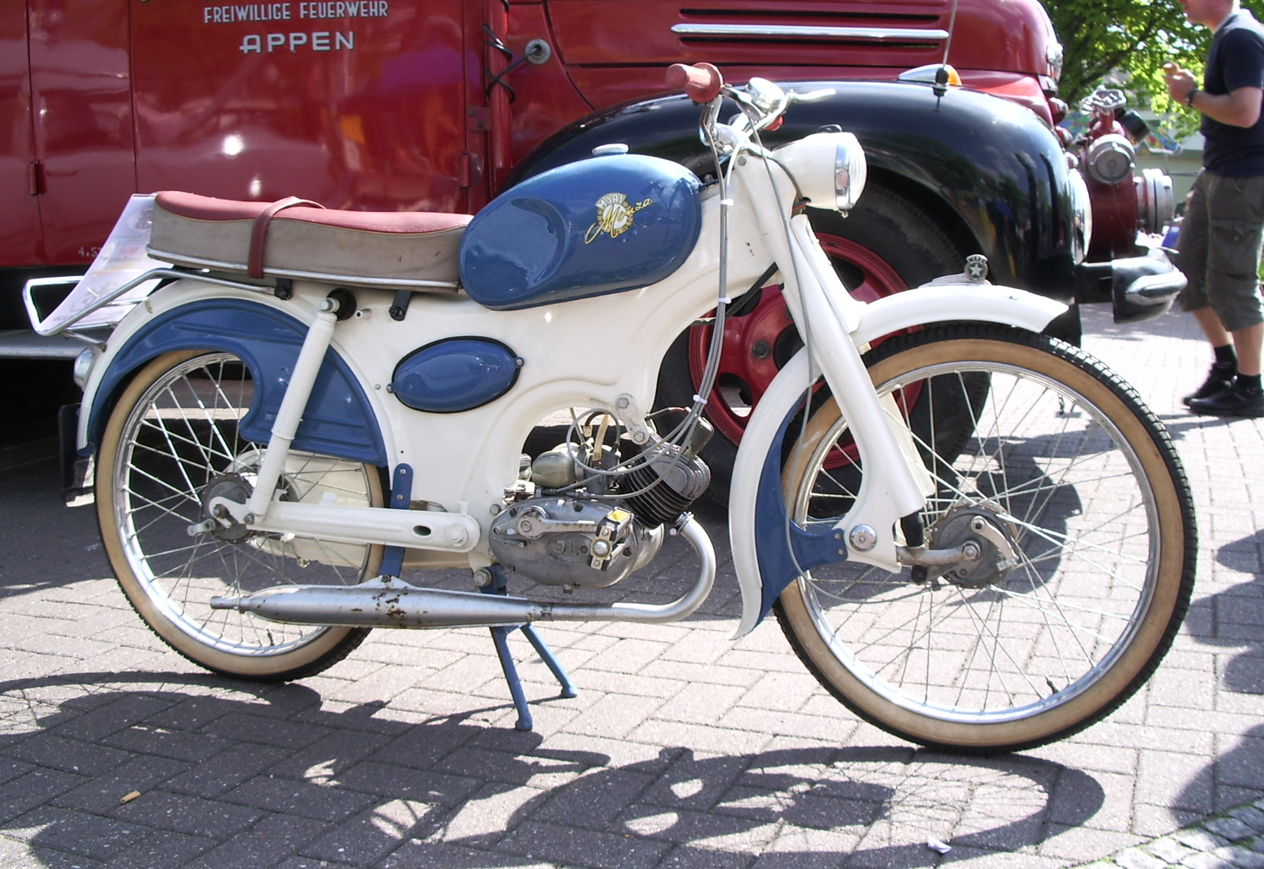 Mars Monza (Moped) mit ILO Piano Motor beim Oldtimertreffen in Uetersen.